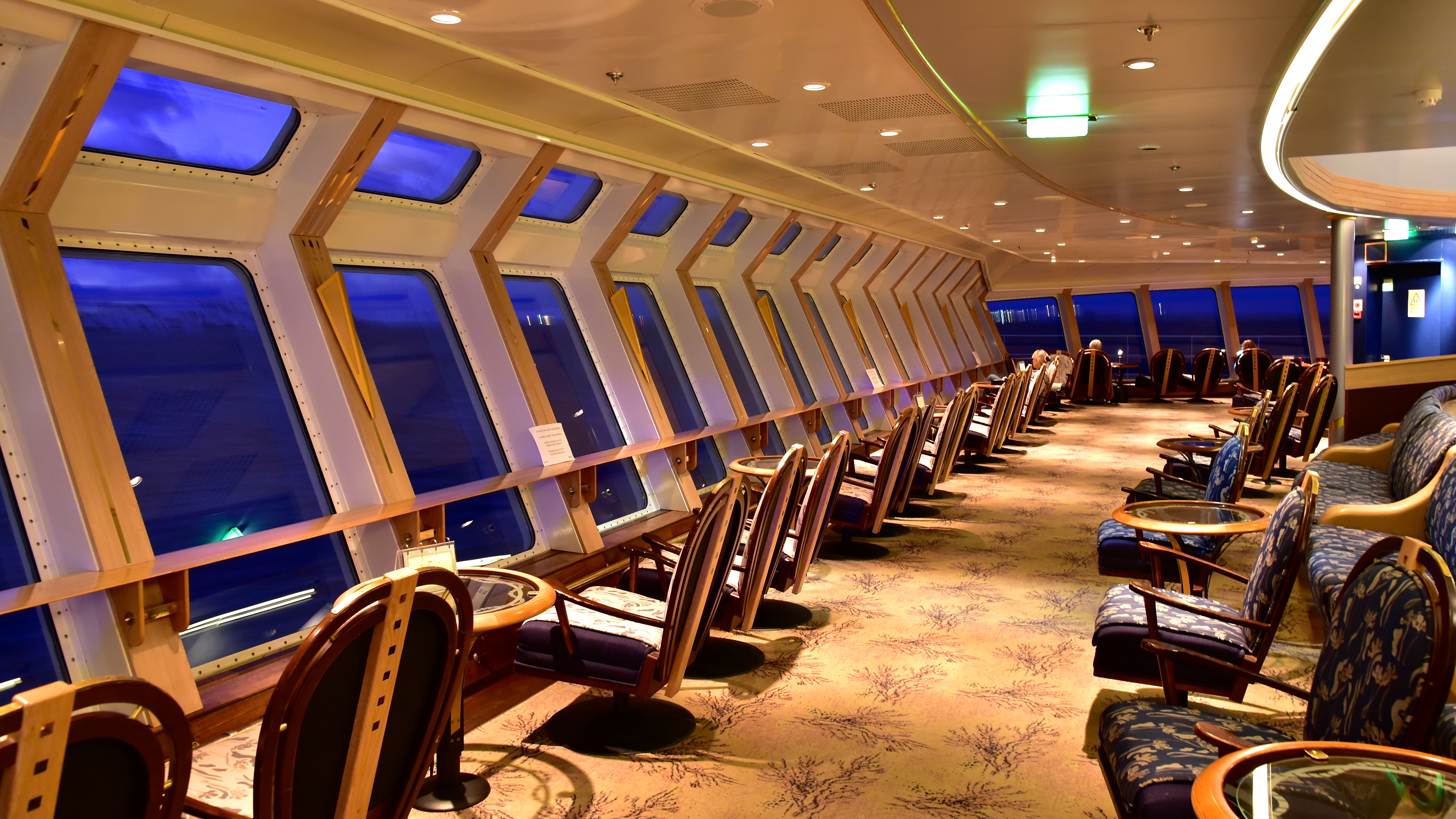 Hurtigruten Ferry / Cruise